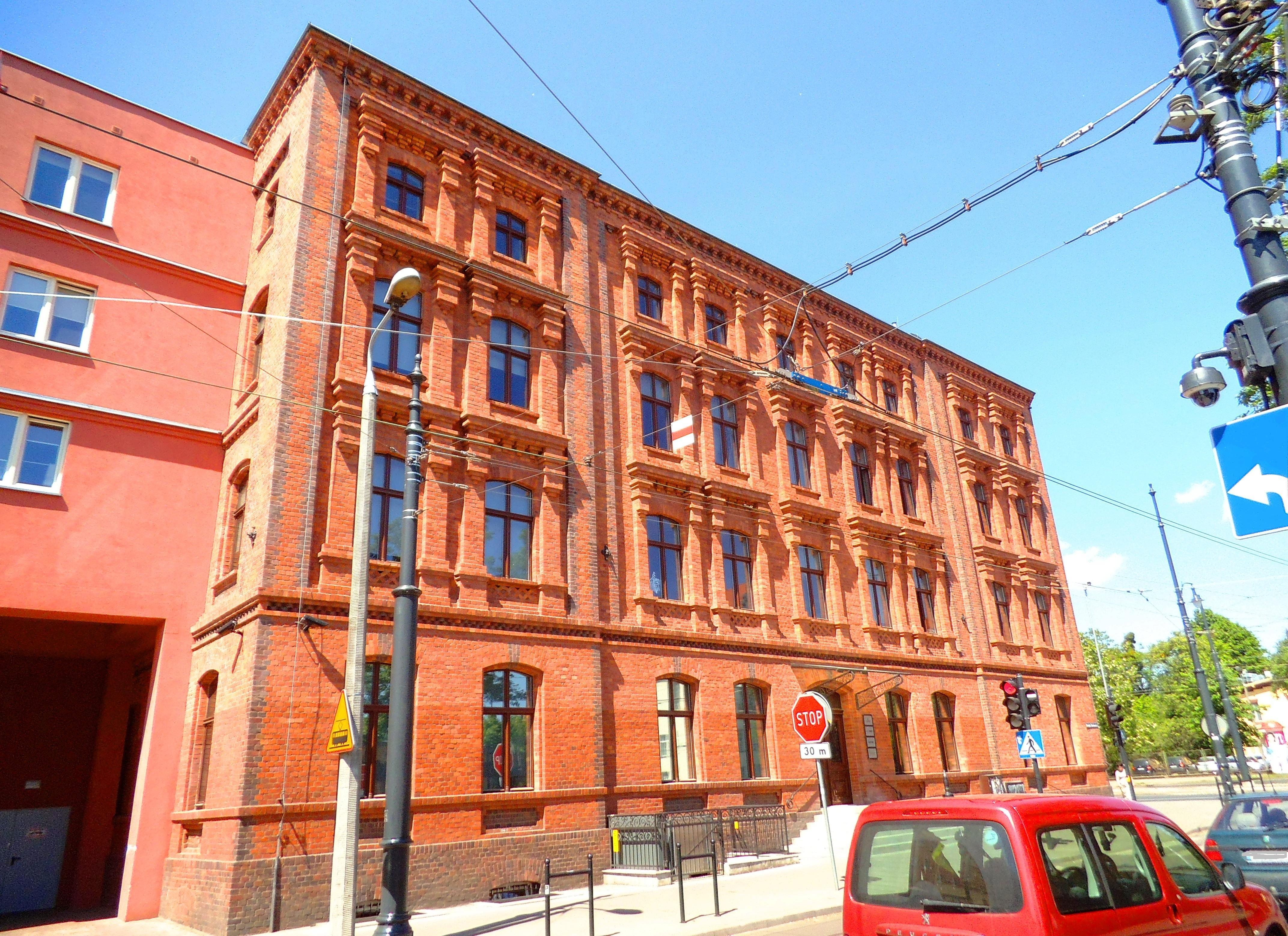 Biurowiec Calypso Office Center w Toruniu